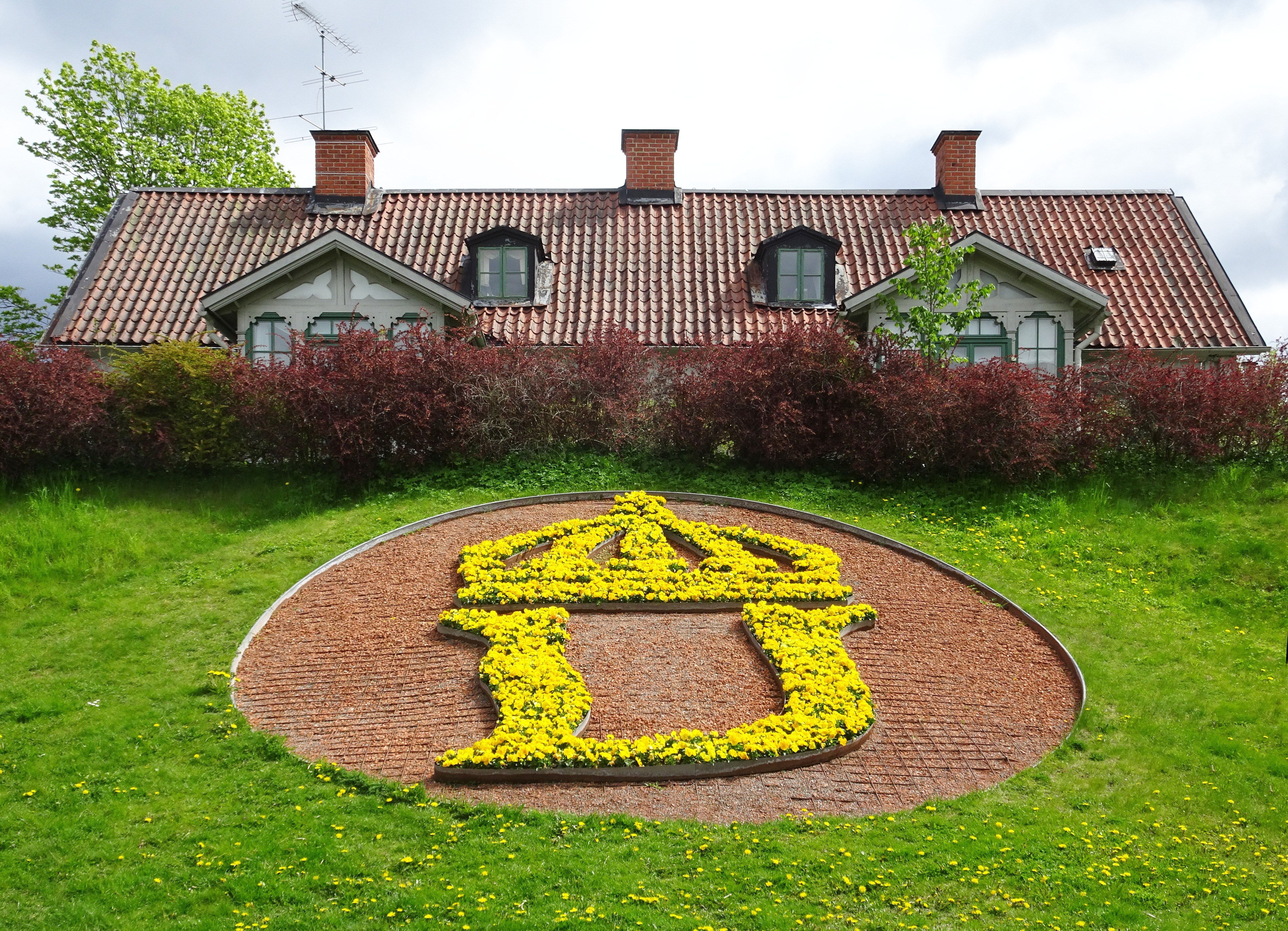 Slottsfogdebostaden, Ulriksdal. "U" på planteringen står för Prins Ulrik som namngav Ulriksdal